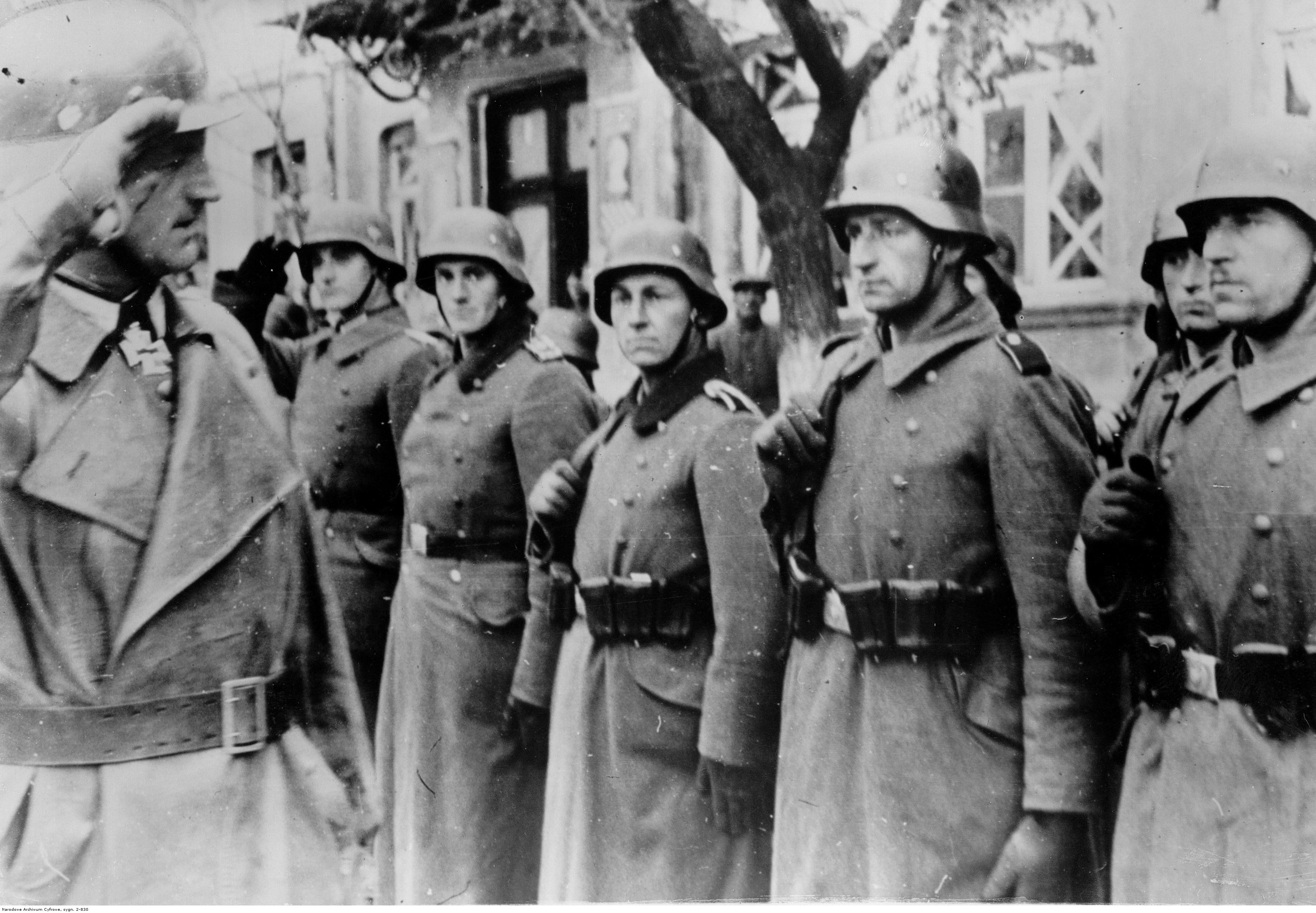 Zdobycie przez wojska niemieckie miasta Kercz. Dowódca oddziału maszeruje przed swoimi żołnierzami.